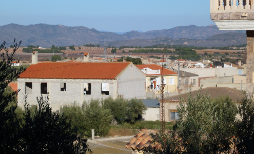 Tazona